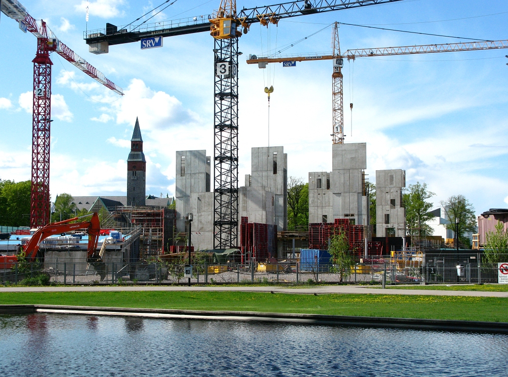 Musiikkitalon työmaa ja Kiasman vesiallas 24. toukokuuta 2009.